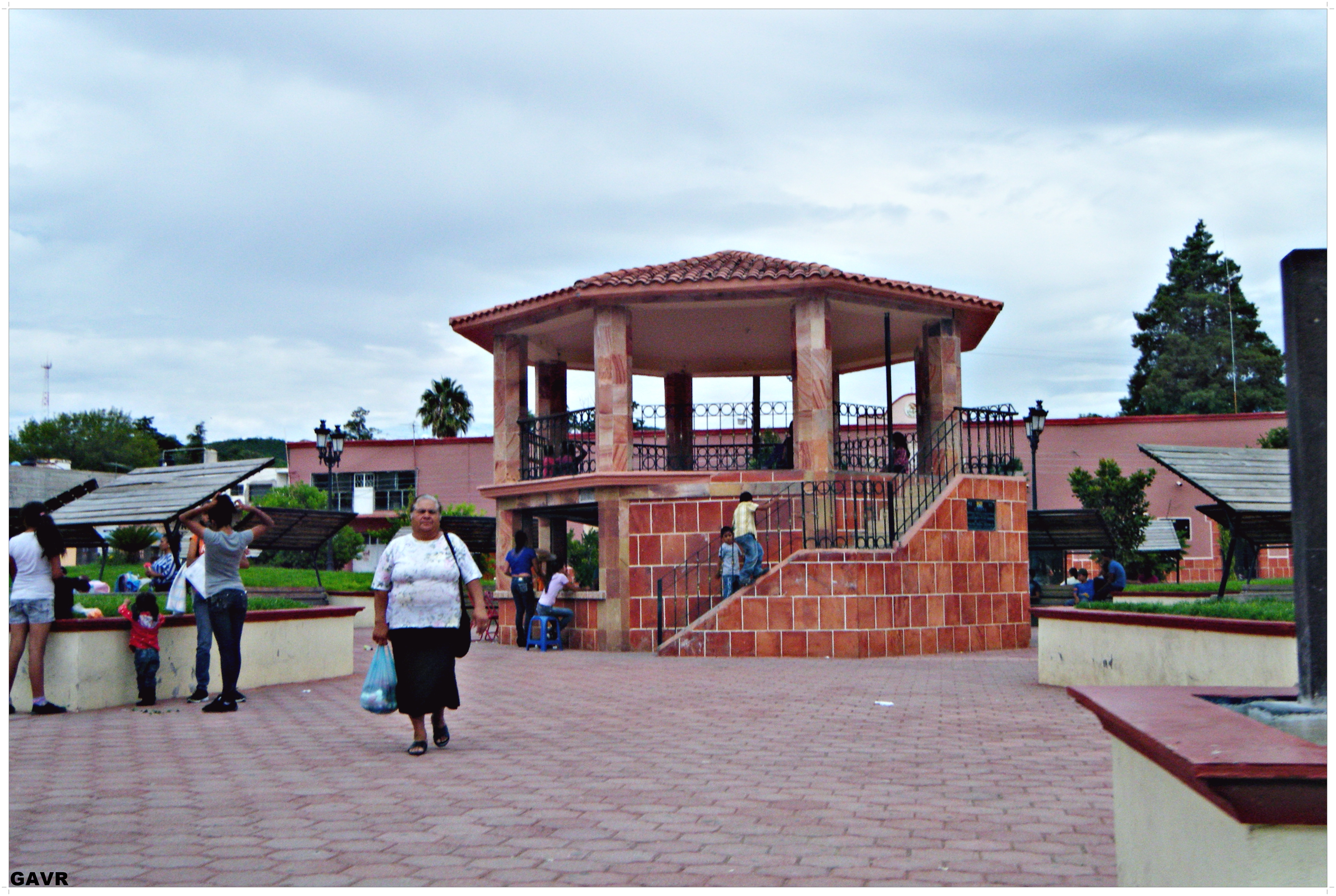 plaza principal de peñon